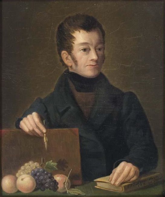 Portret fan de skilder Eelke Jelles Eelkema (1788-1839)